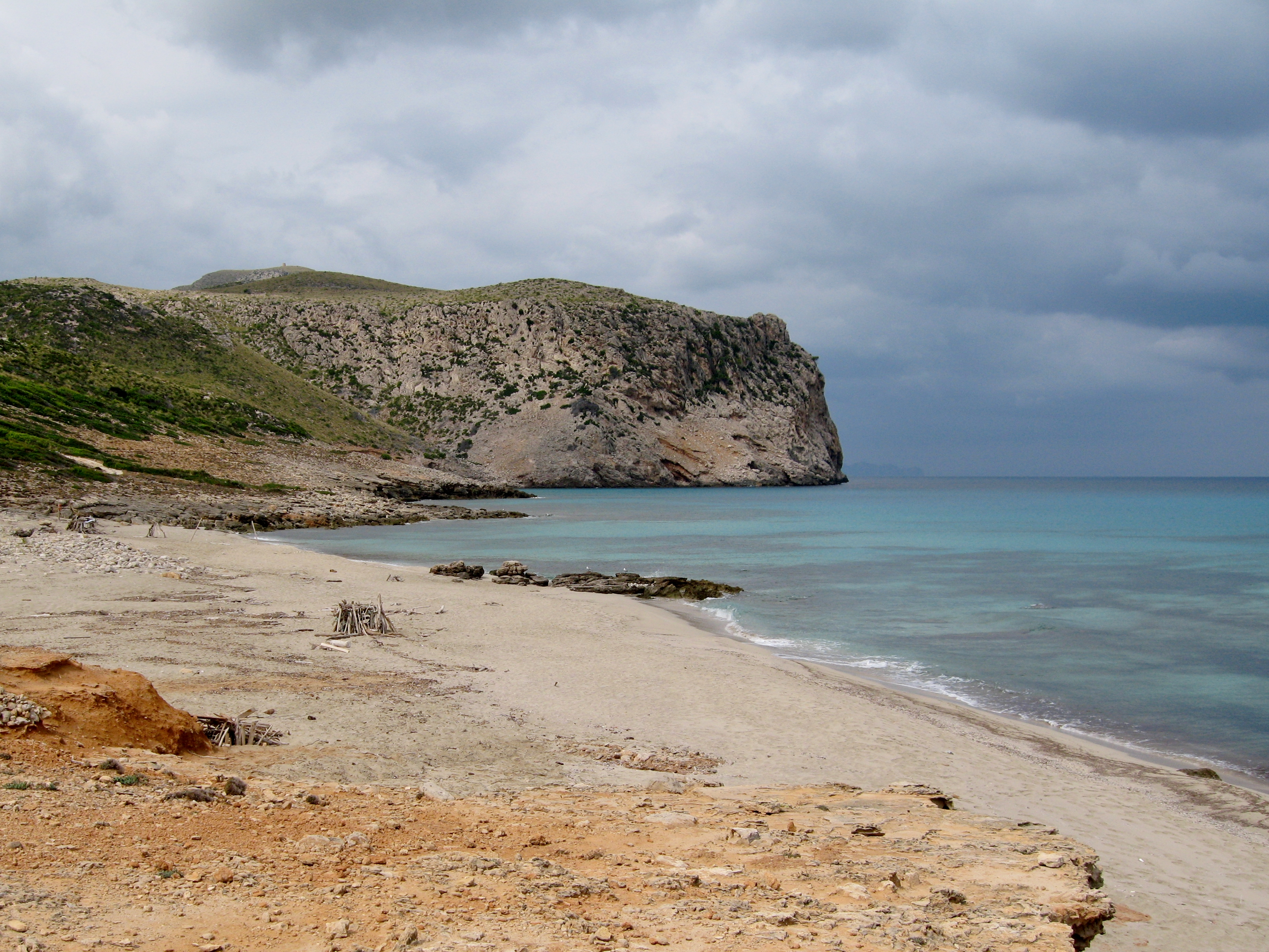 S’Arenalet d’Aubarca, Gemeinde Artà, Mallorca, Spanien